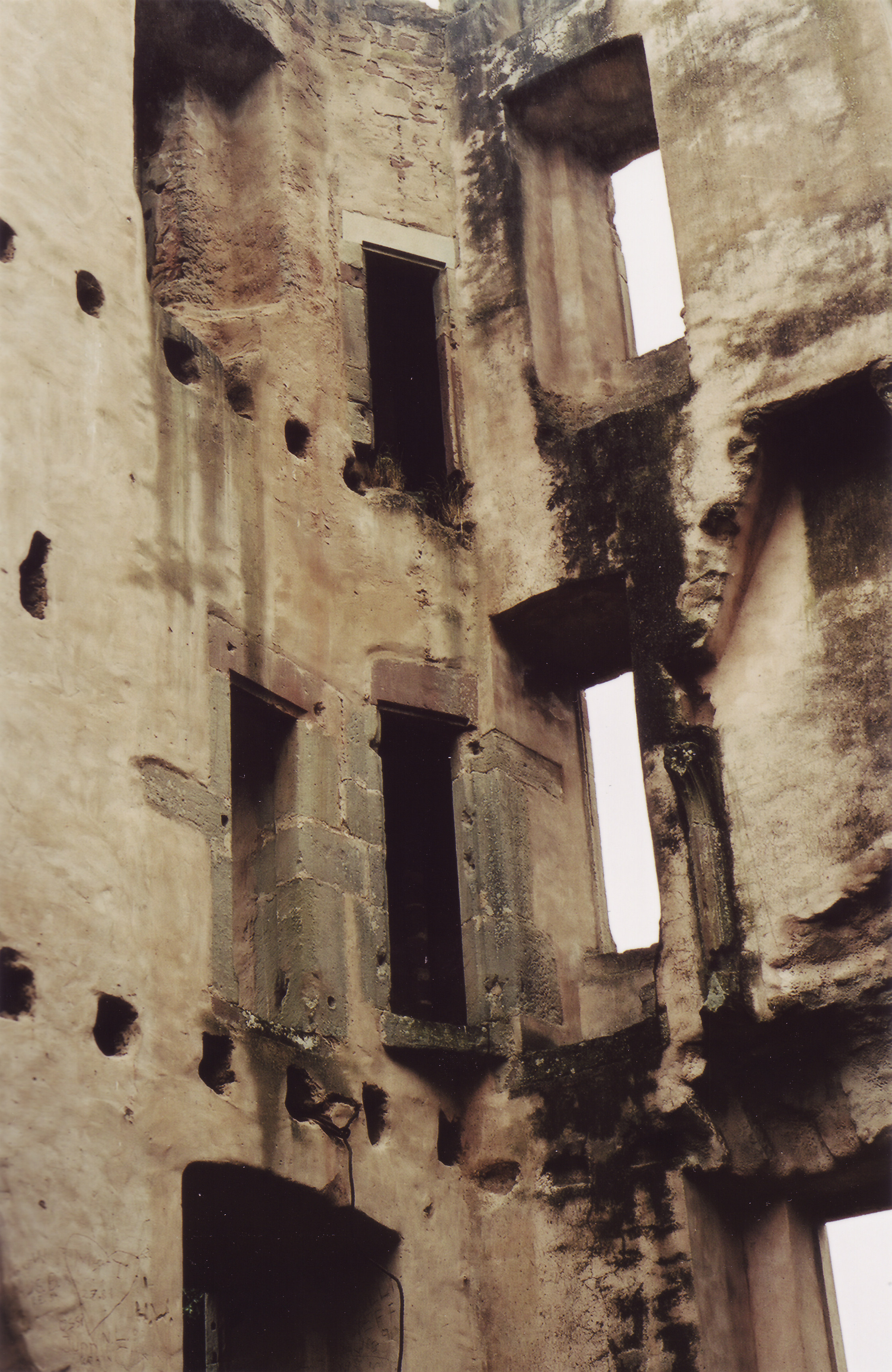 Burgruine Ramstein, Mauern des Wohnturms, Innenansicht